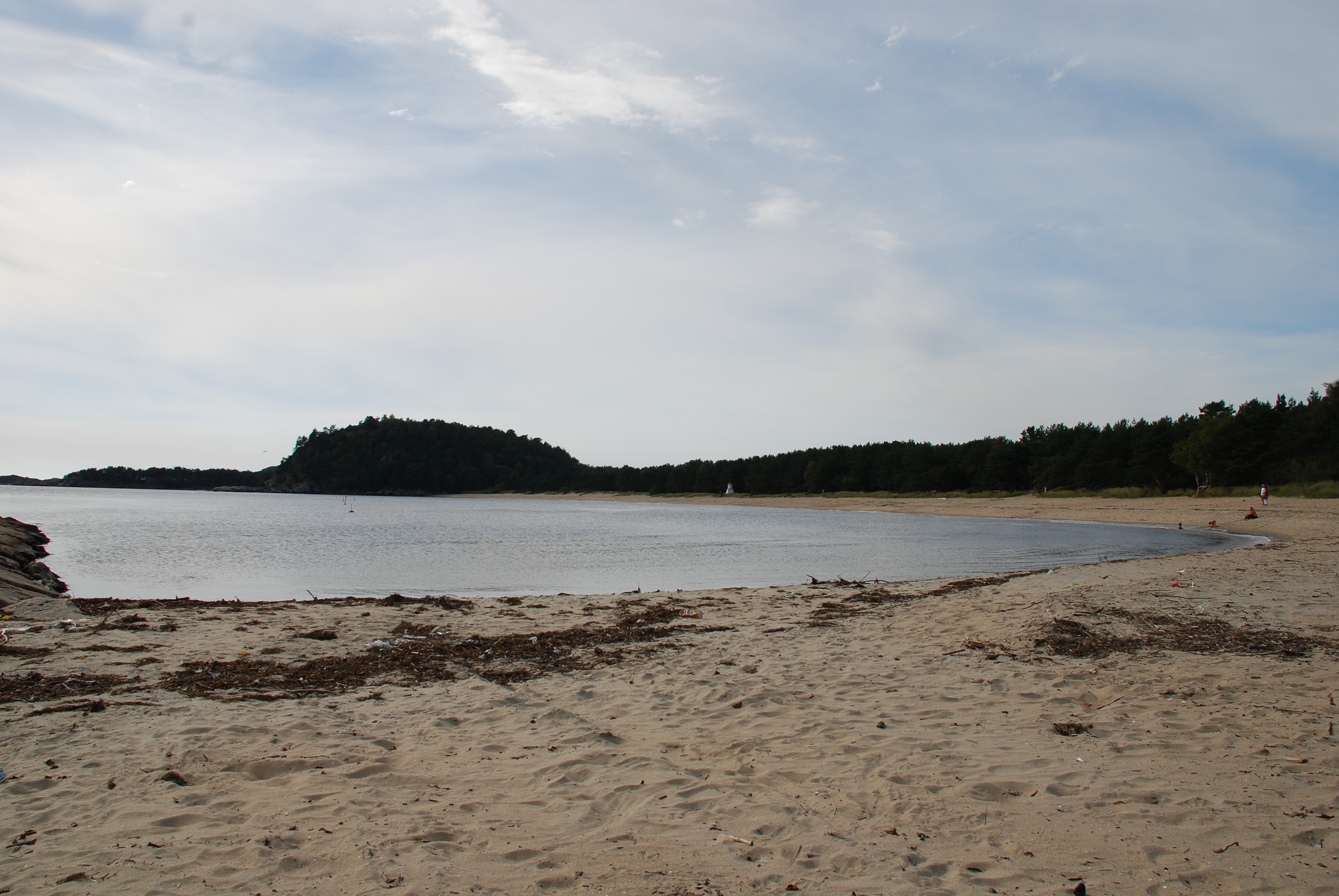 Sjøsanden sett fra piren. Sjøsanden ligger i Mandal på Sørlandet